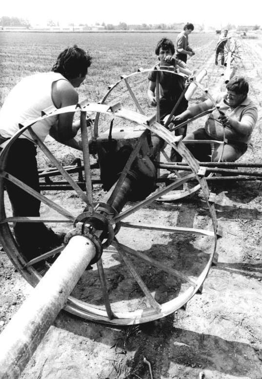 Zwebendorf, Aufbau einer Beregnungsanlage ADN-ZB Lehmann 30.5.1989-We Bez. Halle: Beregnung - Unterstützt durch Einsatzkräfte sind die Beregnungskollektive der LPG (P) Queis auf den Feldern des Saalkreises im Einsatz. Ein Beregnungskollektiv reichtet eine mobile Anlage zur Zusatzbewässerung auf einem Feld bei Zwebendorf ein.